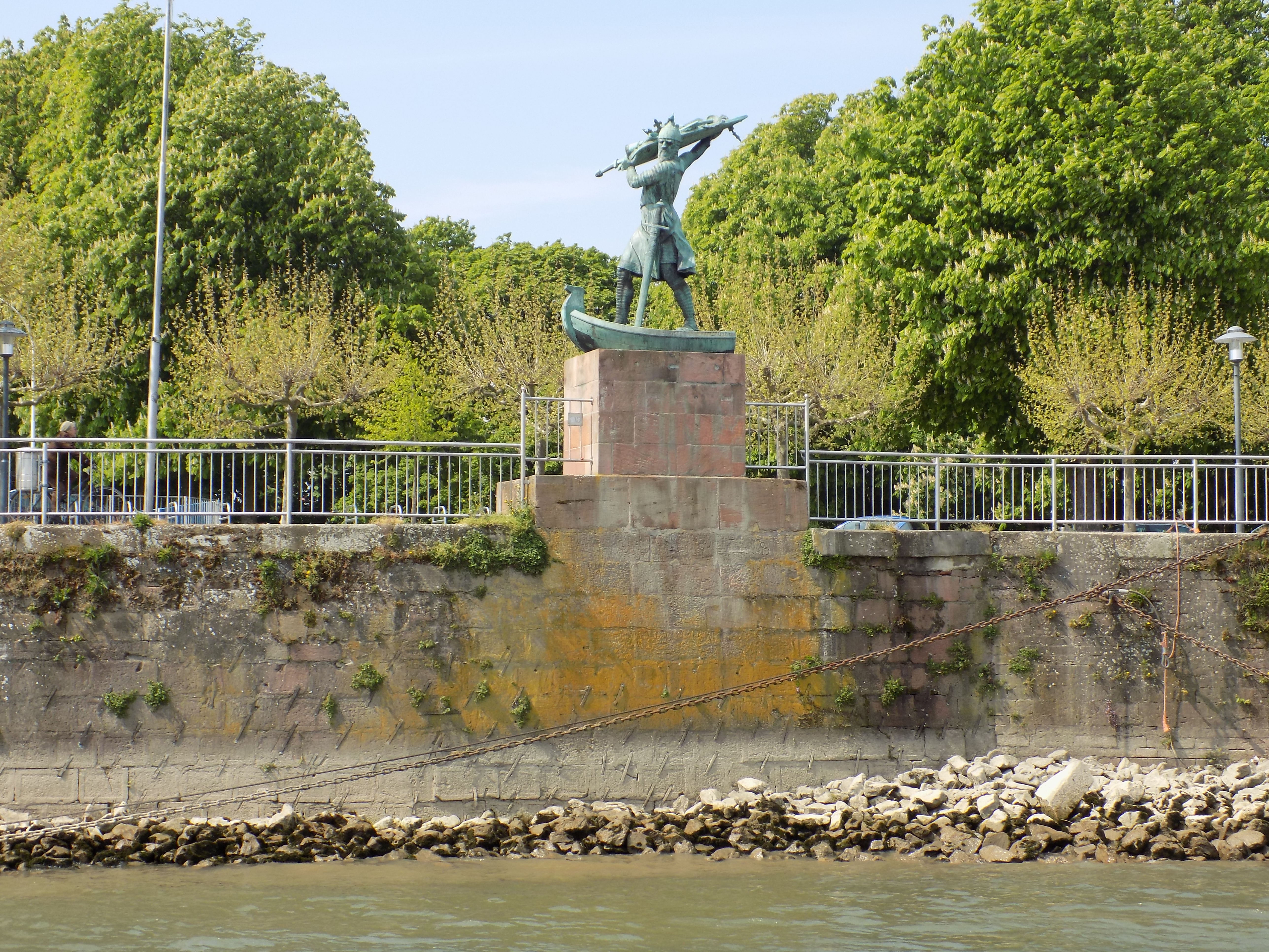 Hagendenkmal Worms Rheinseite